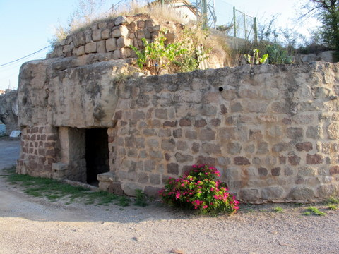 restes del Castell de Puig-reig